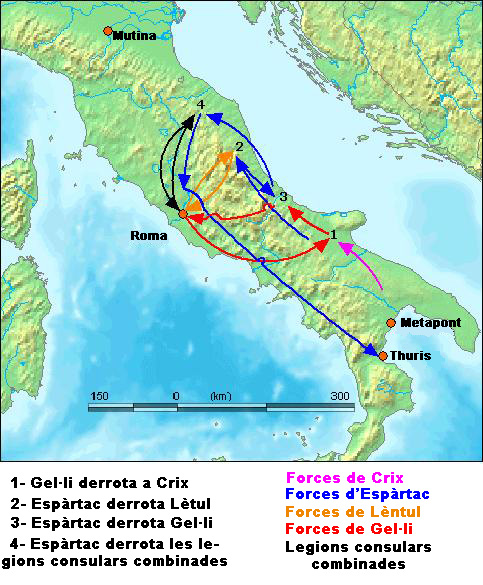 tercera guerra servil